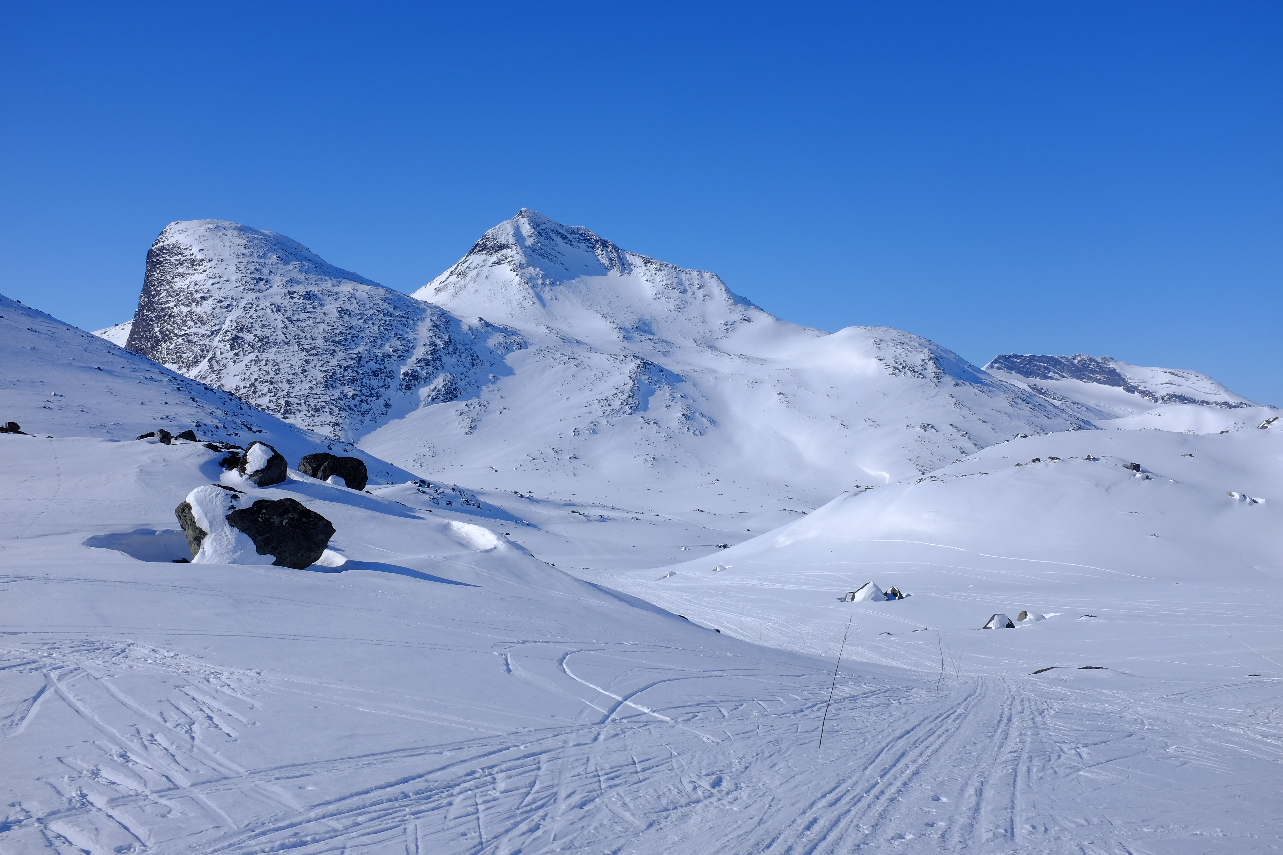 Olavsbunuten and Mjølkedalstinden seen from the Rauddalsbandet